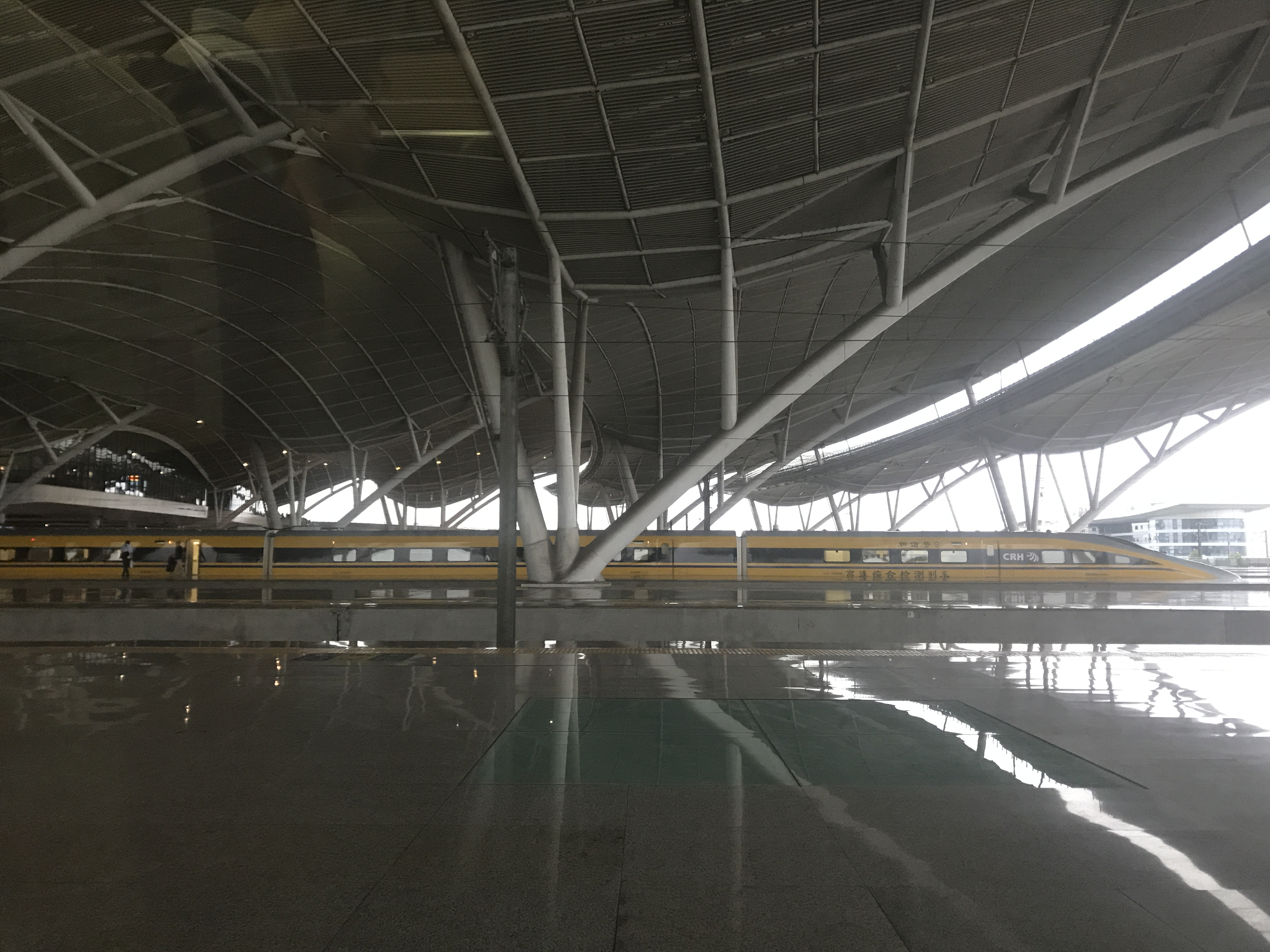 武漢駅のホーム